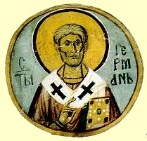 Germanus I, Germanos I. von Konstantinopel - Fresko im Altarraum der Kirche der Jungfrau Maria im Serbischen Kloster Studenica.